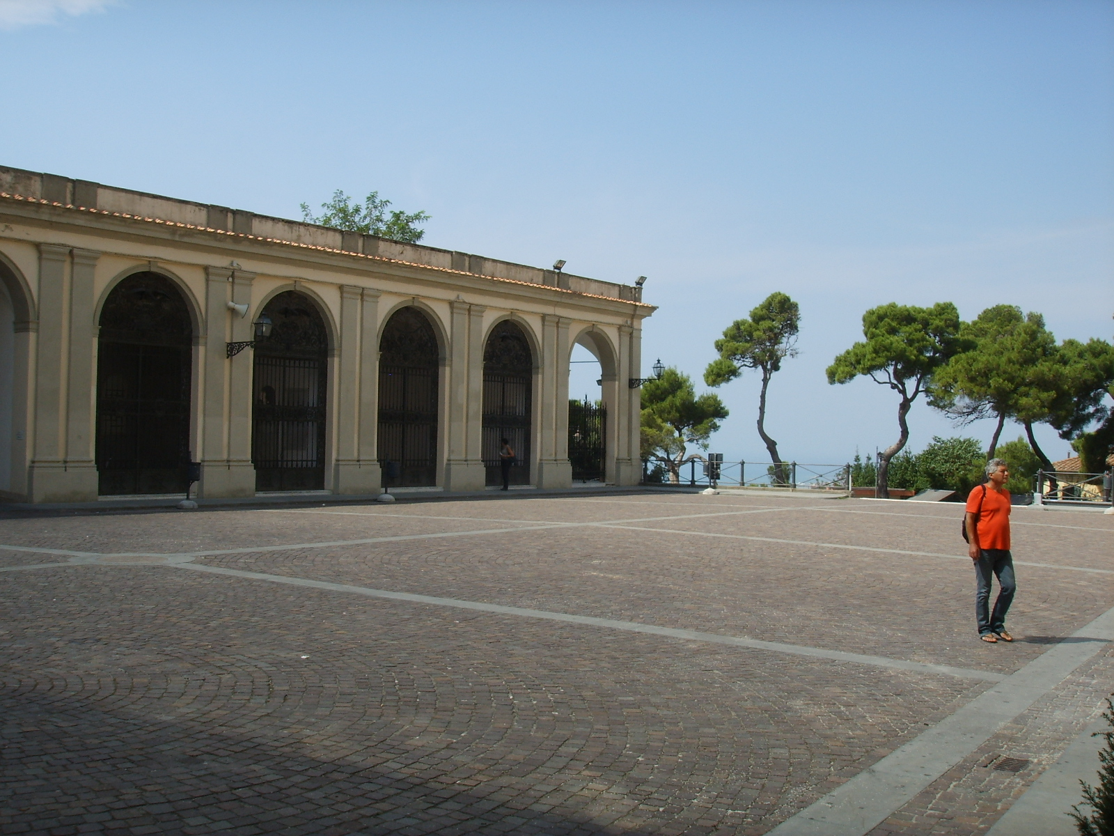 Livorno: il Famedio sul colle di Montenero dove sono sepolti livornesi illustri.